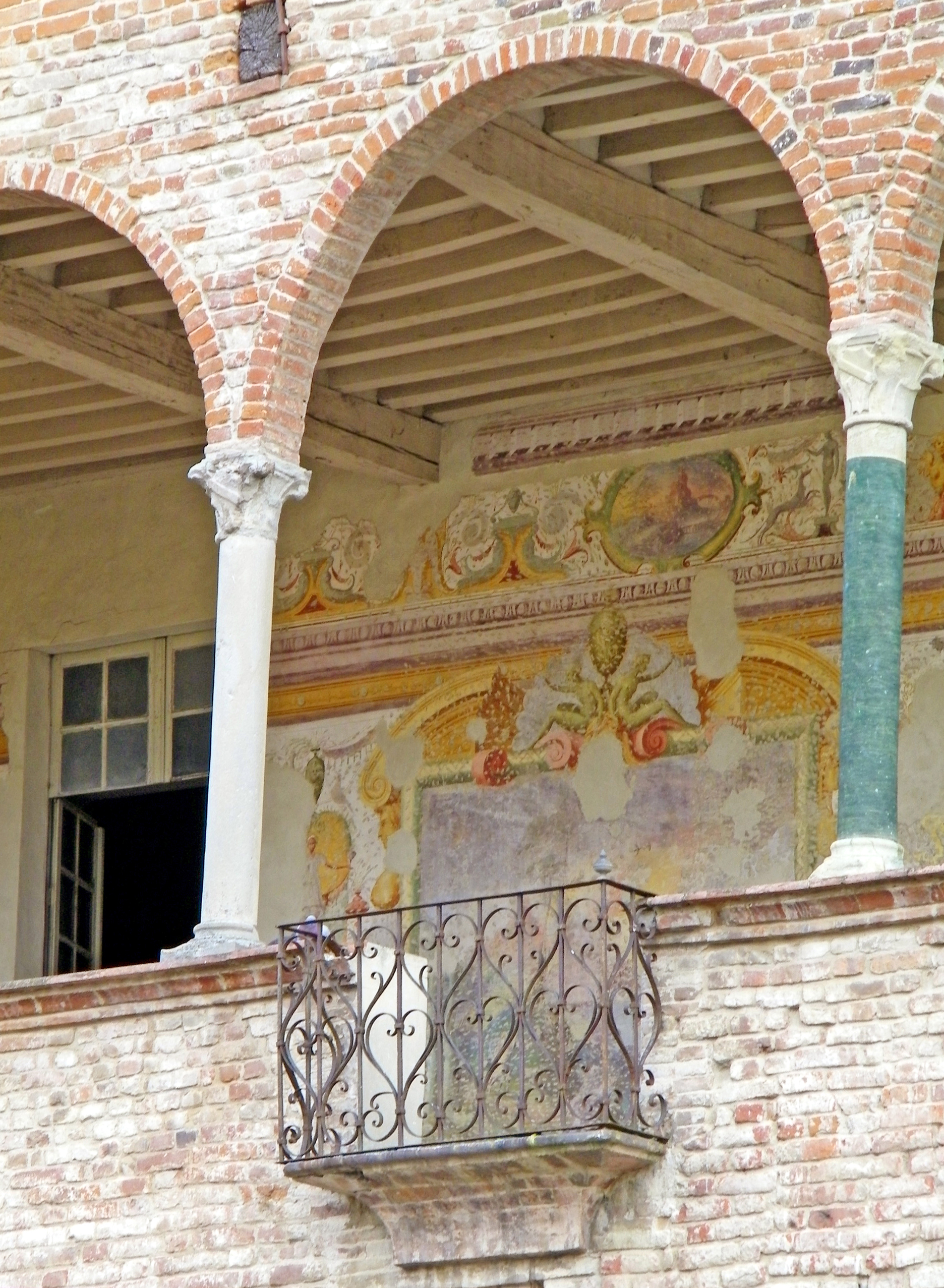 Rocca di Fontanellato (loggiato)